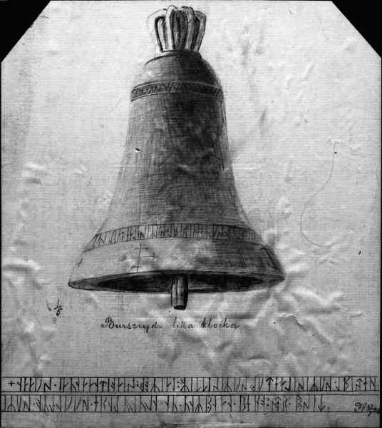 Kyrkklocka. Foto efter teckning av Per Vistrand, 1880. Kategori: (10) Klockor Kyrkklocka. Foto efter teckning av Per Vistrand, 1880.